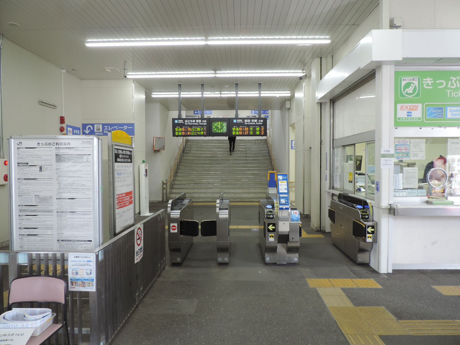 和邇駅の改札口